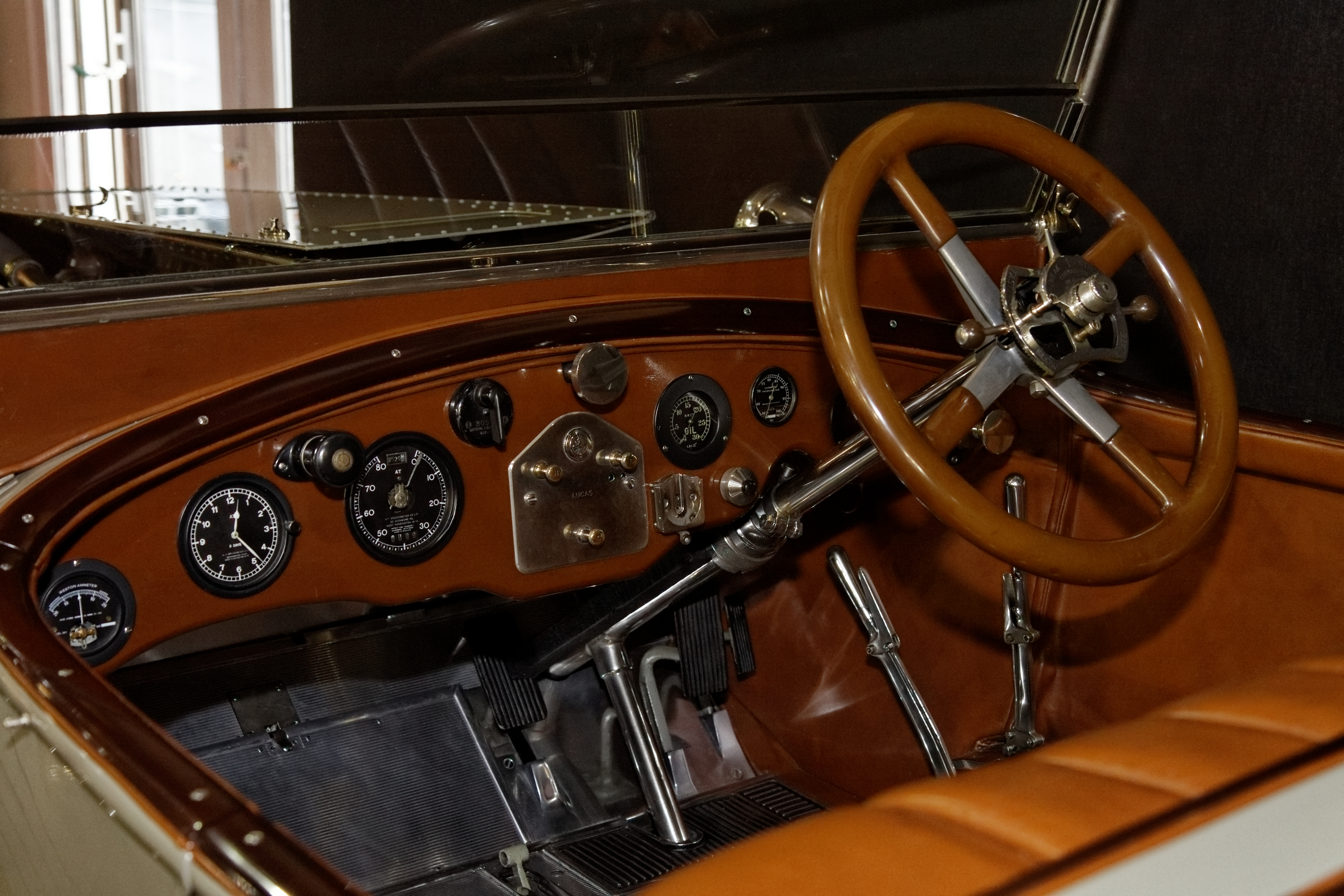 Rolls Royce 40 50 Silver Ghost